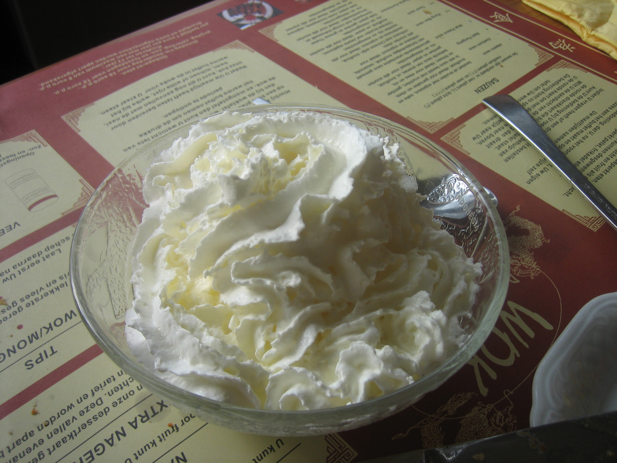 Het is een bordje met slagroom!